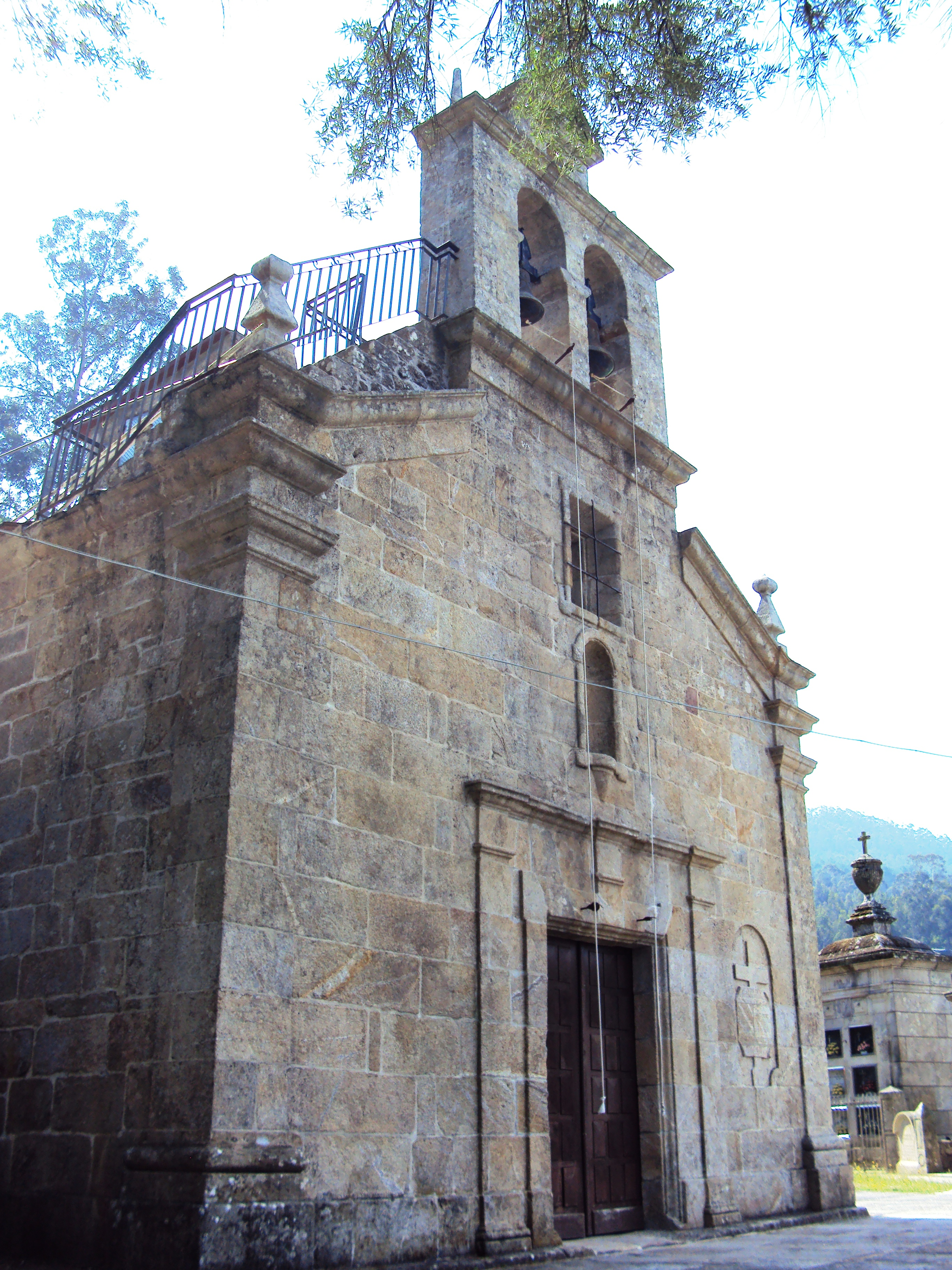 Santa Baia de Camos, Nigrán